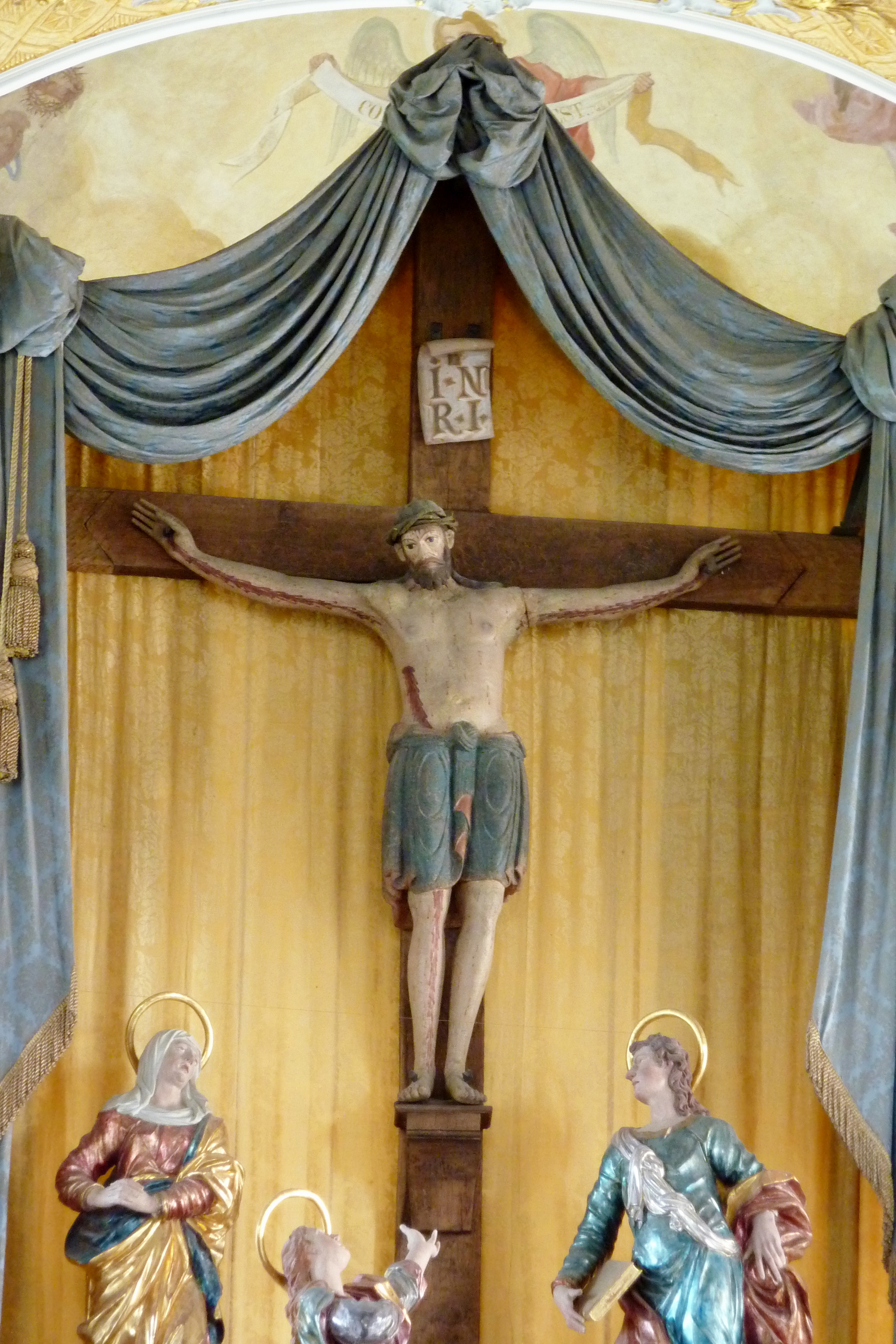 Katholische Pfarr- und Wallfahrtskirche St. Jakobus und Laurentius in Biberbach im Landkreis Augsburg (Bayern), romanisches Holzkruzifix im Viernageltypus, um 1220, im Chor (Gnadenbild Herrgöttle von Biberbach)